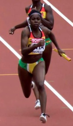 d8_3 4x100m reeksen dames